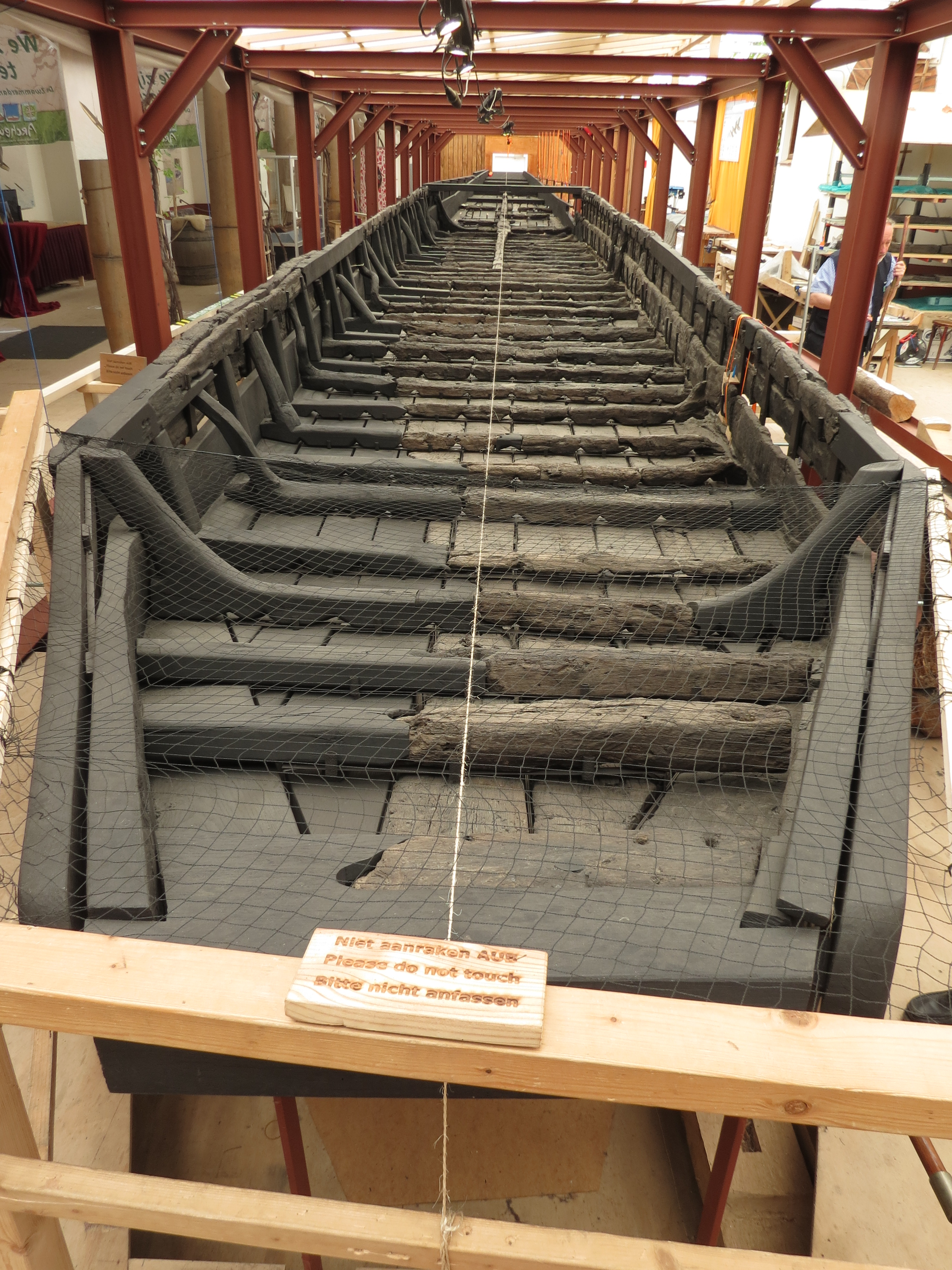 Zwammerdamschepen in Museumpark Archeon